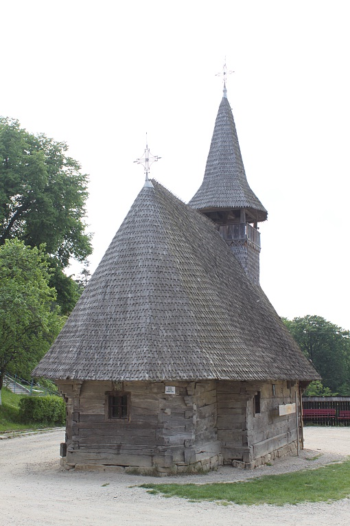 Biserica de lemn din Gostila, județul Sălaj.